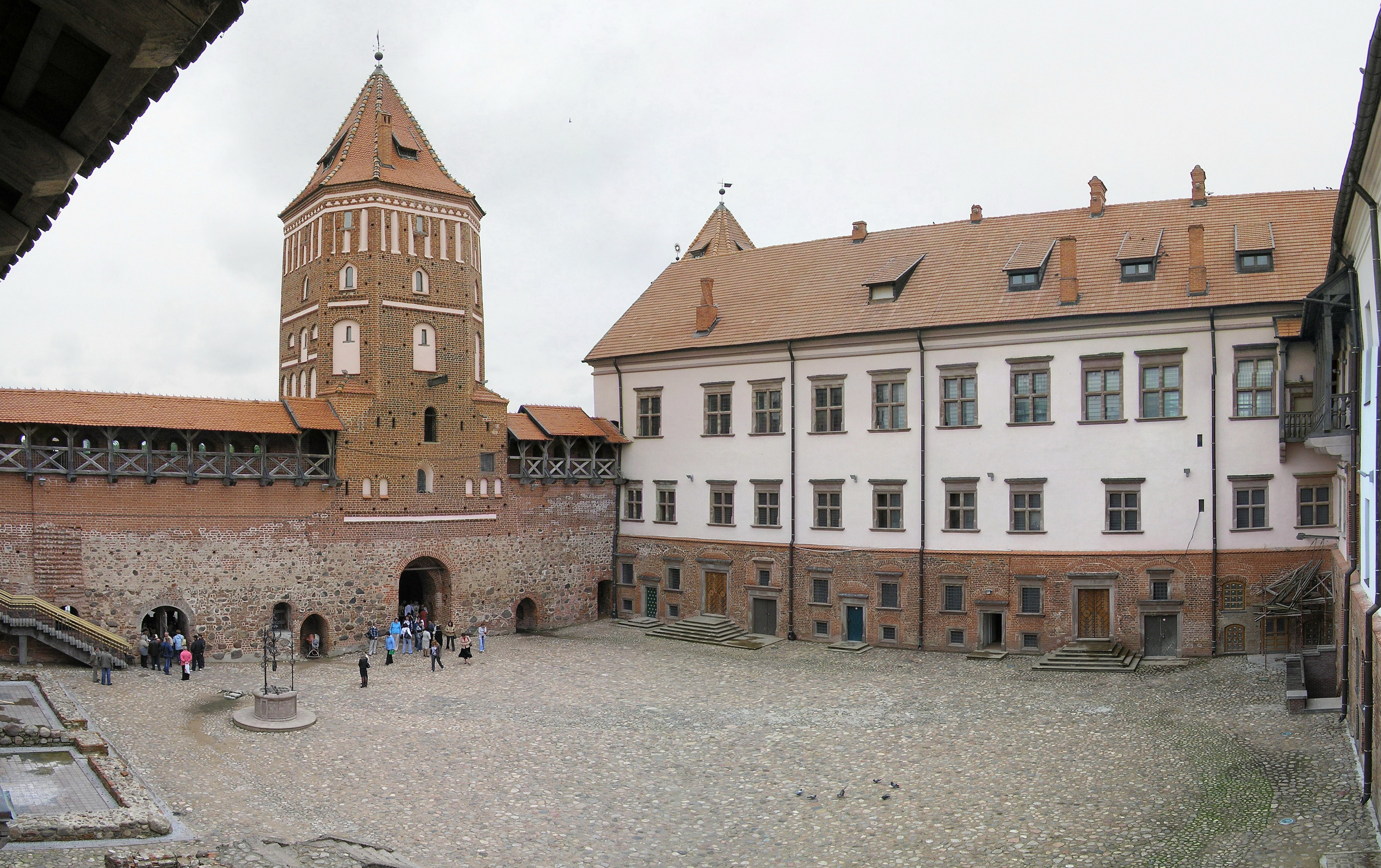 Беларуская (тарашкевіца): Замкавы комплекс «Мір». Будынкі, збудаваньні, пляніровачная структура, ляндшафтныя кампазыцыі, рэшткі земляных абарончых збудаваньняў, элемэнты абвадненьня. г.п. Мір This is a photo of Belarusian heritage monument. Reference number: 410Г000317 ( WLM)